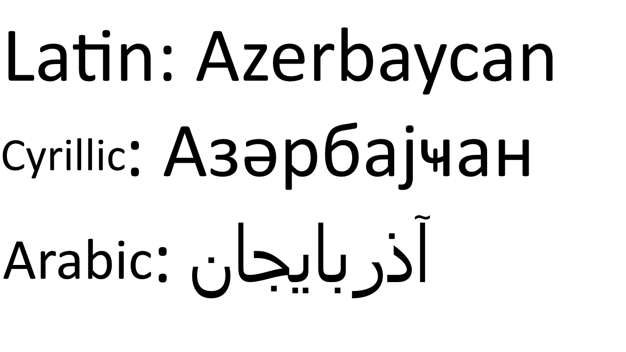 Word "Azerbaijan" In 3 Writing Types